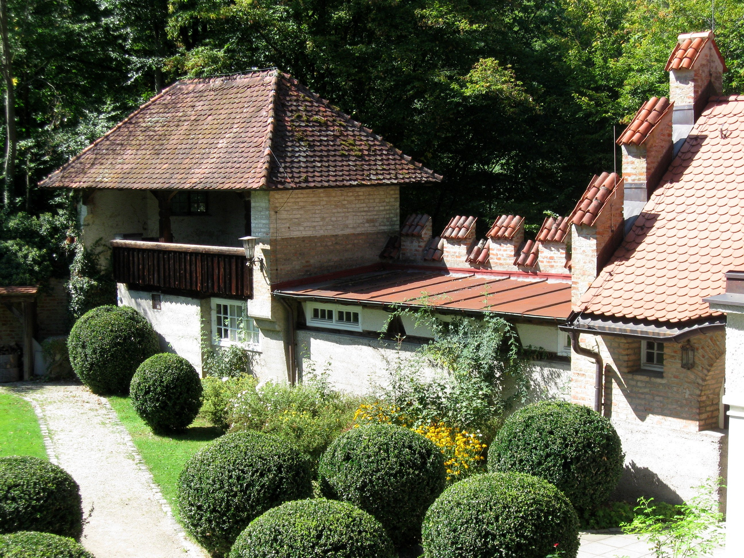 Burg Schwaneck, Pullach